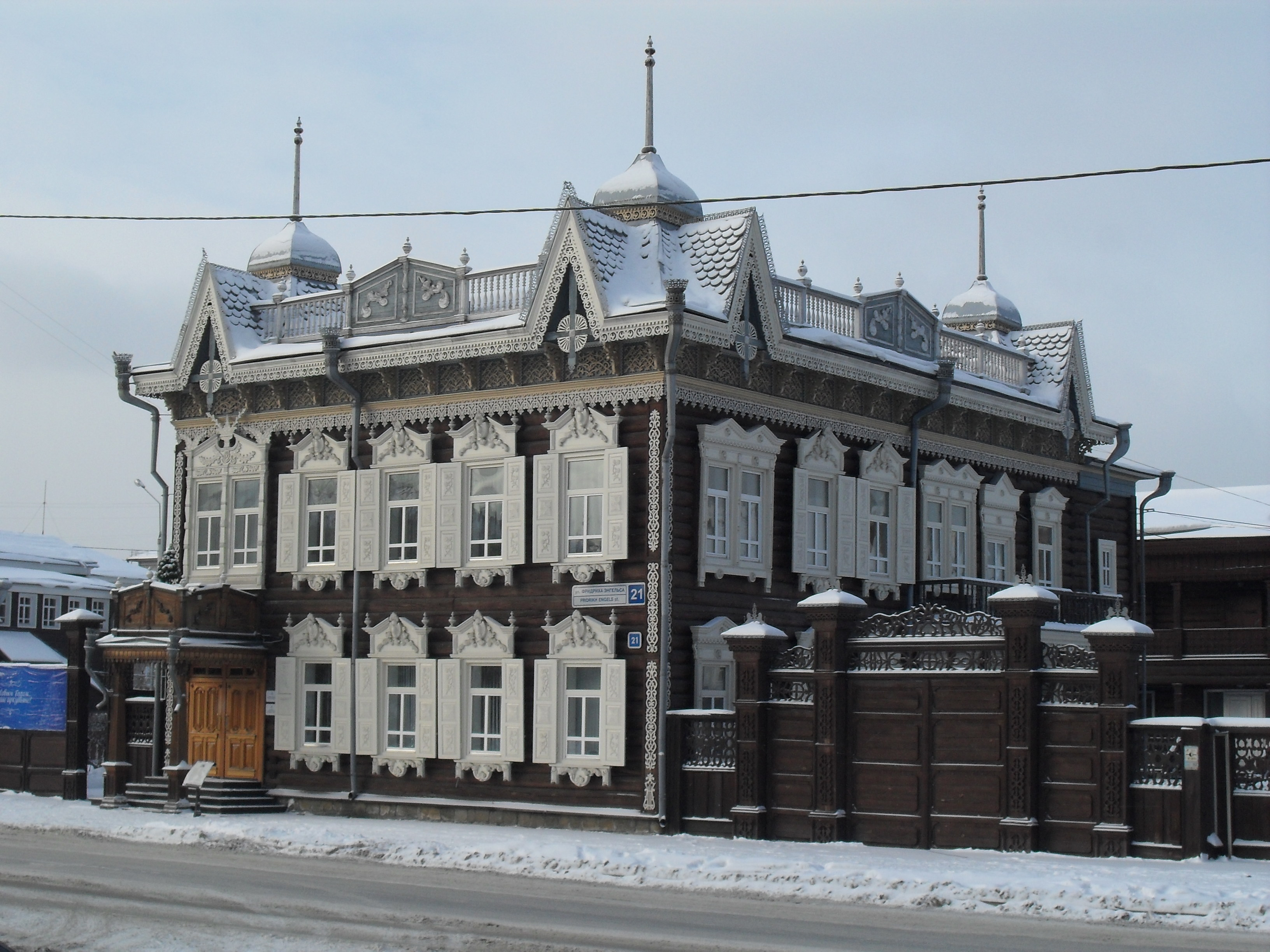 Иркутск. Дом купцов Шастиных. Середина XIX в. Ул. Фридриха Энгельса. д. 21. Ныне "Дом Европы".